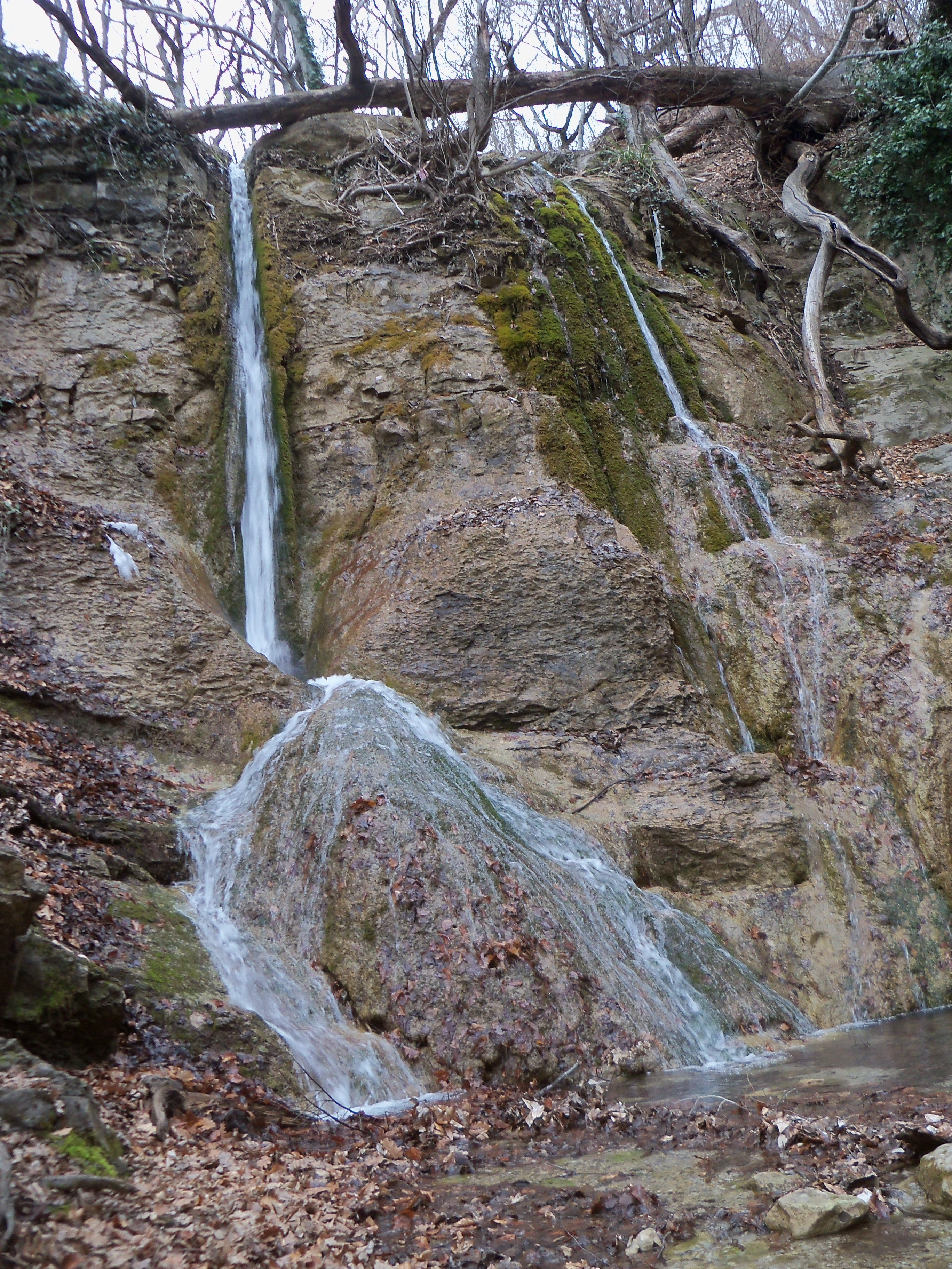 Фото